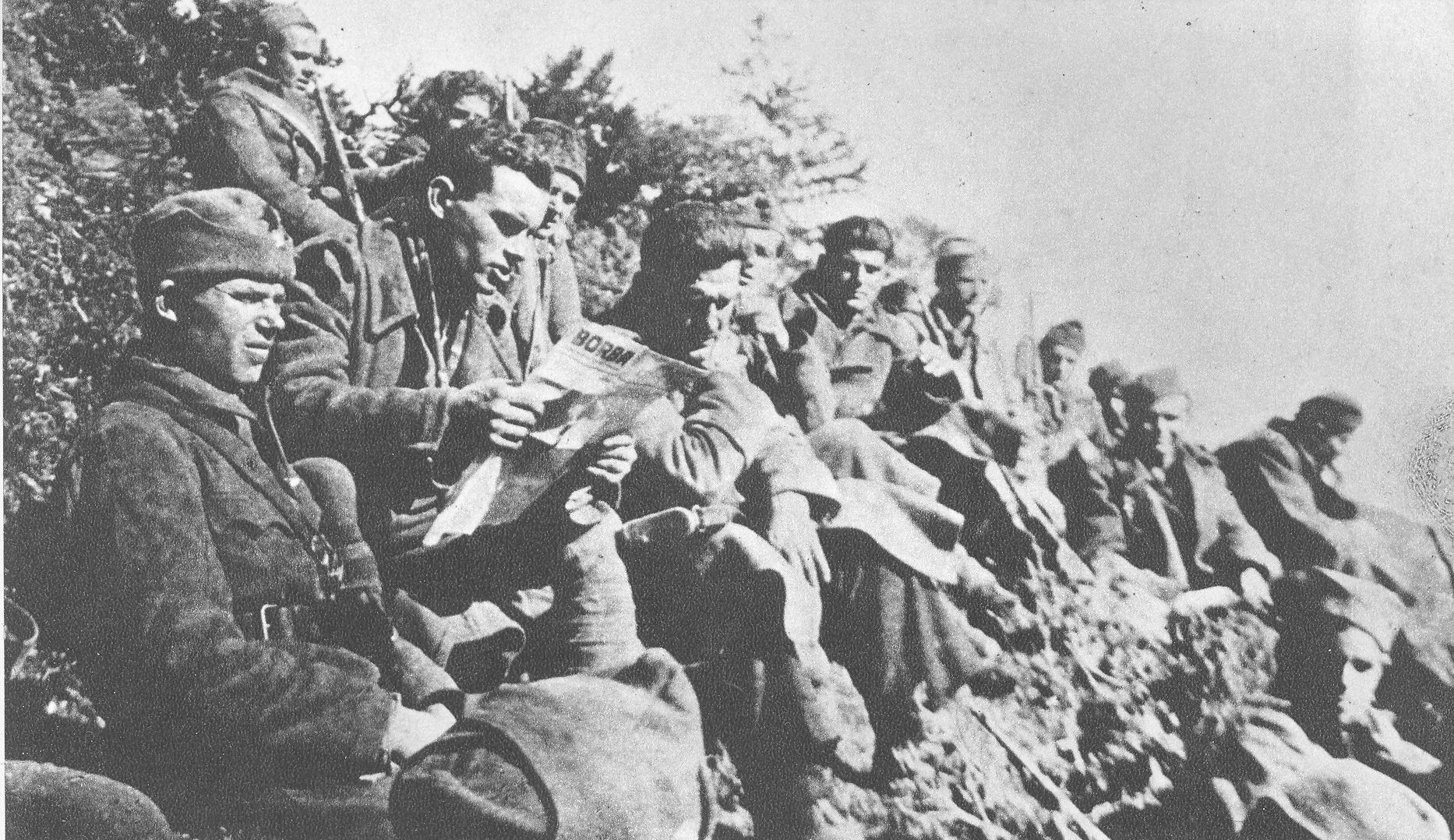 Srpskohrvatski / српскохрватски: U jesen 1942 godine na položaju kod Mliništa borci prvog bataljona Prve proleterske brigade čitaju "Borbu" koja je izlazila u Drinićima. »Borbu« čita Savo Mašković puškomitraljezac u prvom bataljonu. Mašković je poginuo u decembru 1944. godine na Sremskom frontu kao komandant Osme crnogorske brigade. Proglašen je za narodnog heroja.